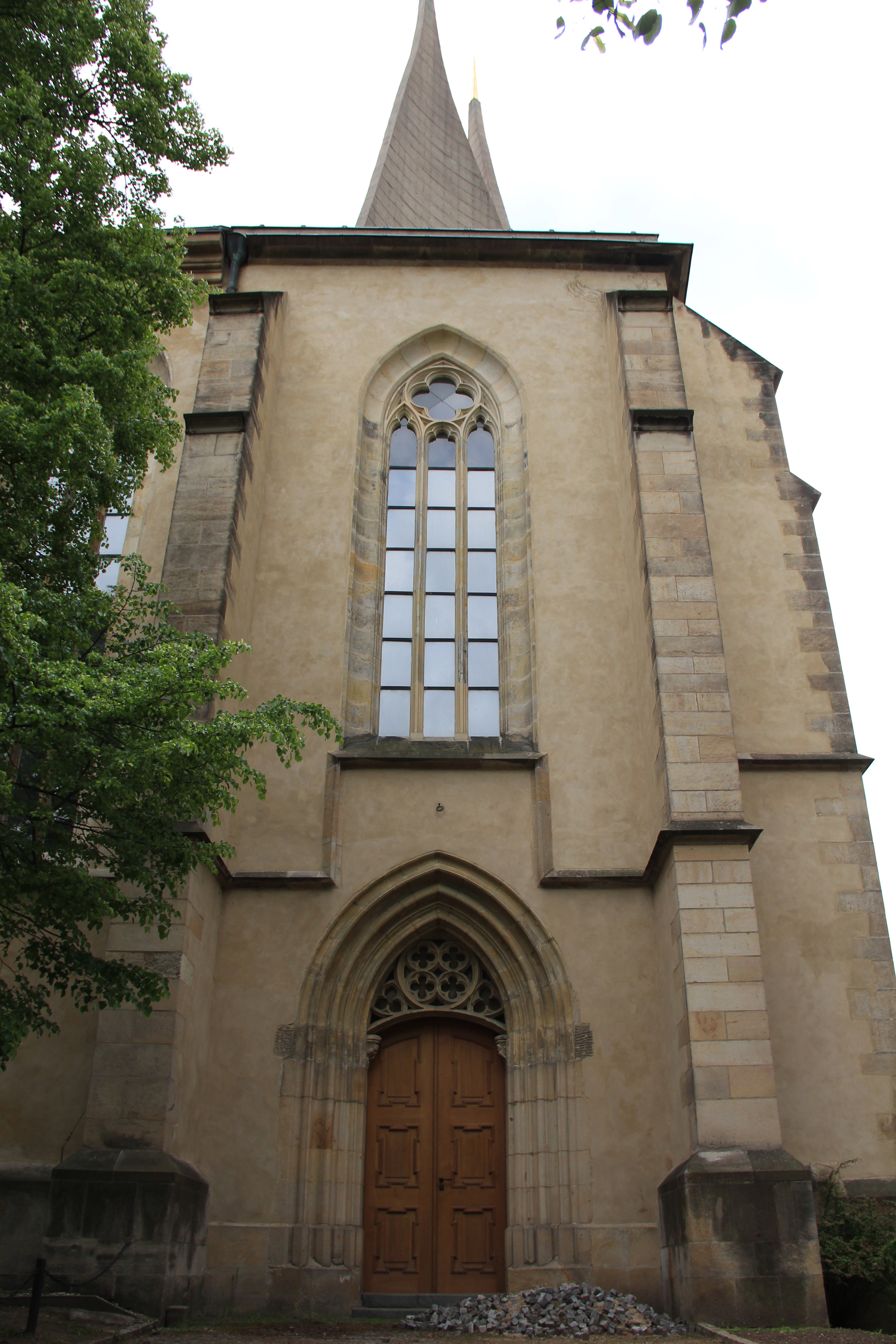 Portál